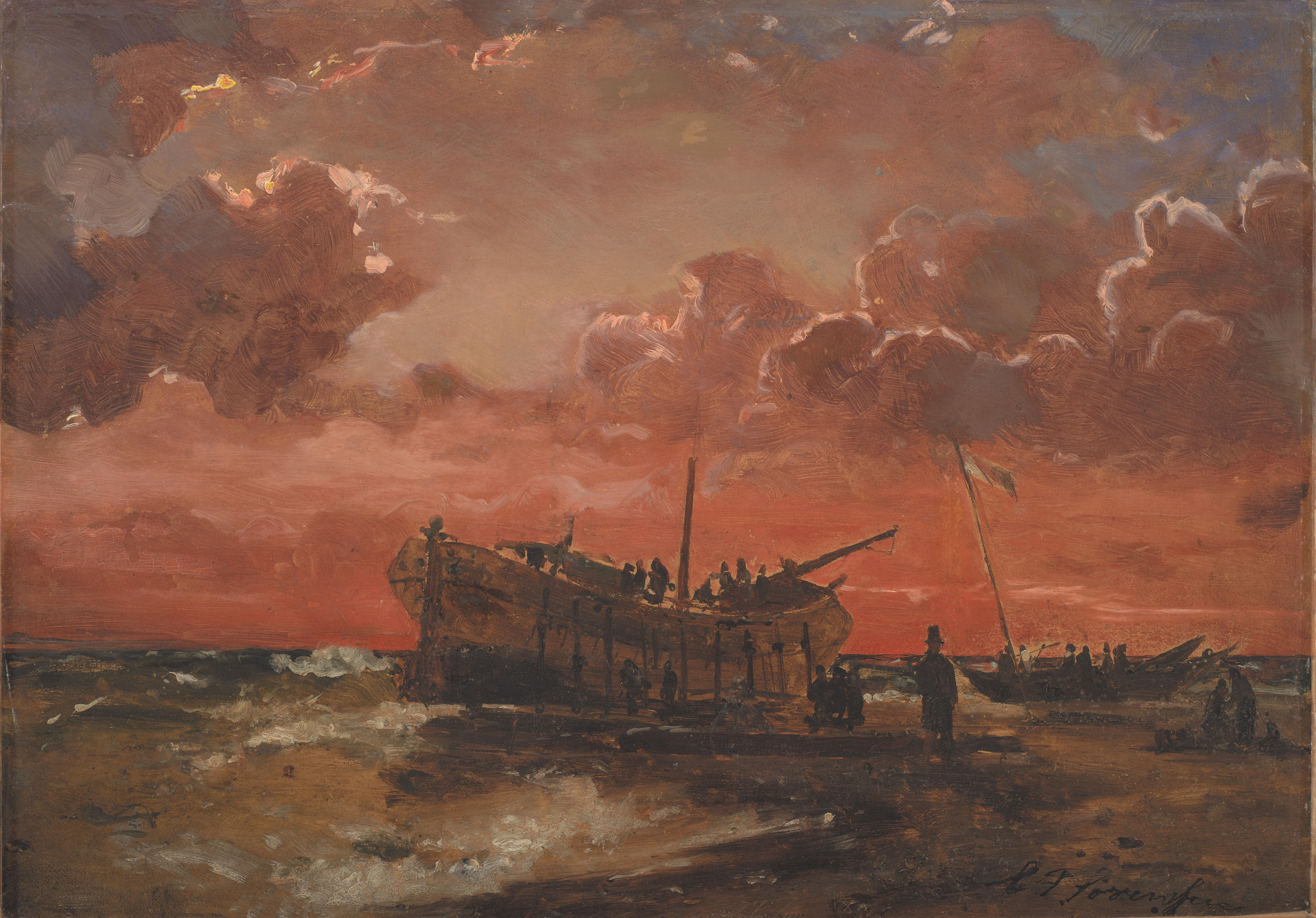 Danish: Et vrag på Jyllands vestkyst ved solnedgangA Wreck on the West Coast of Jutland at Sunsetlabel QS:Len,"A Wreck on the West Coast of Jutland at Sunset" label QS:Lde,"Ein Wrack an der Westküste von Jütland im Sonnenuntergang" label QS:Lda,"Et vrag på Jyllands vestkyst ved solnedgang"